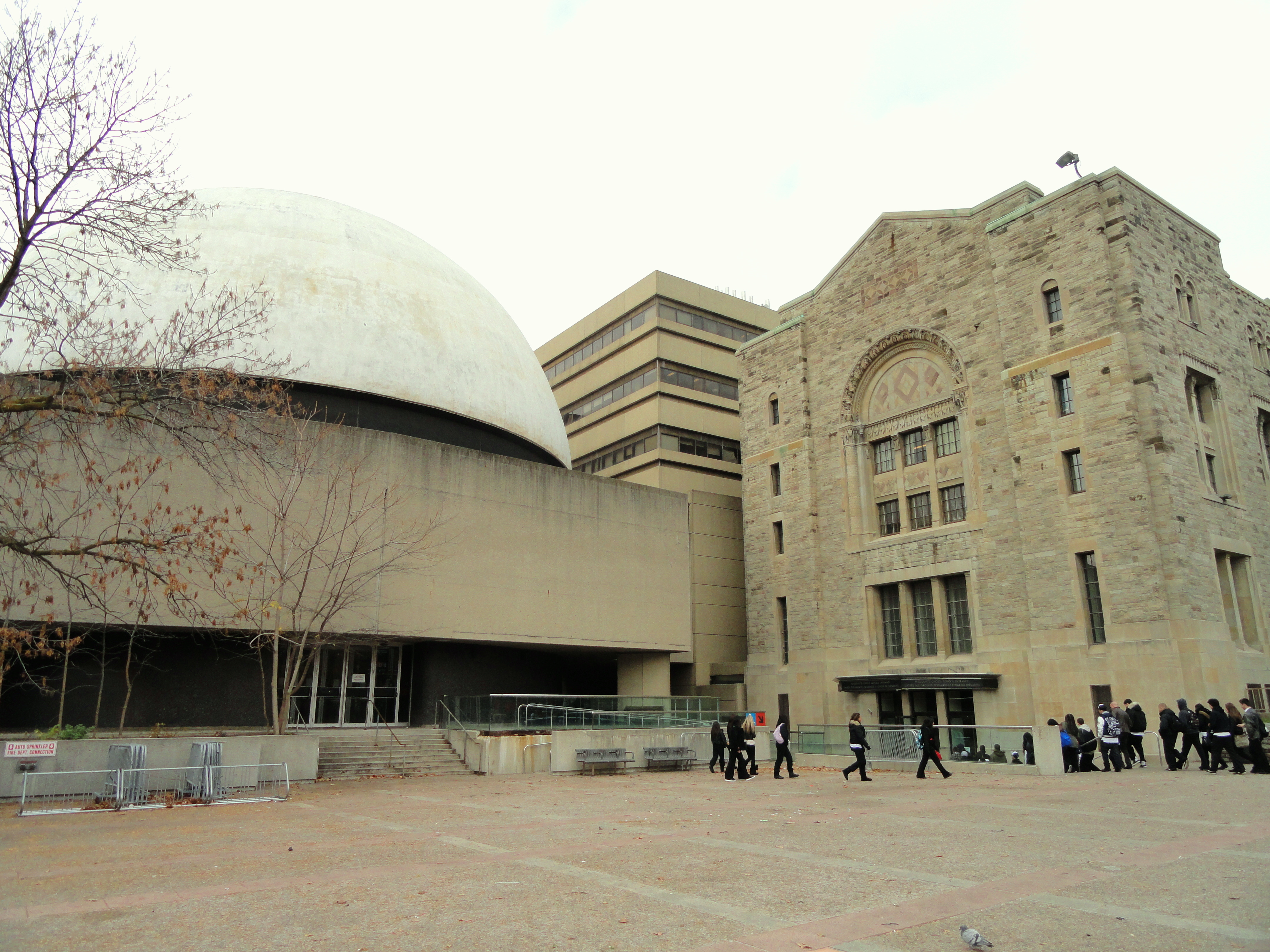 Royal Ontario Museum, Toronto, Ontario, Canada.